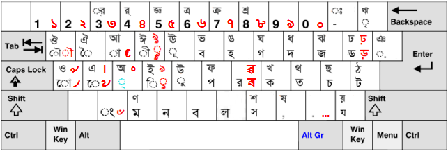 Windowsのベンガル語キーボード